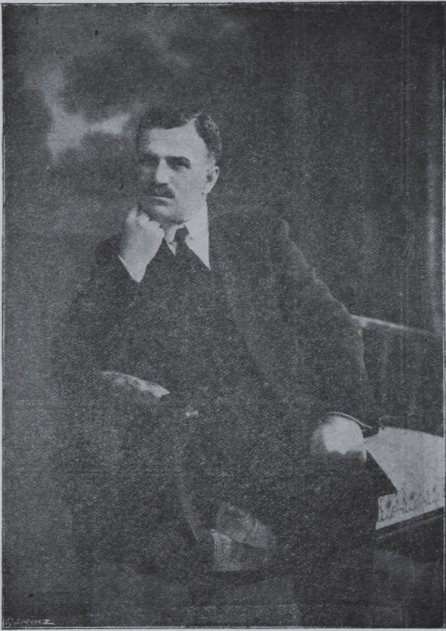 griechischer Reeder und Bänker, 19.-20. Jahrhundert